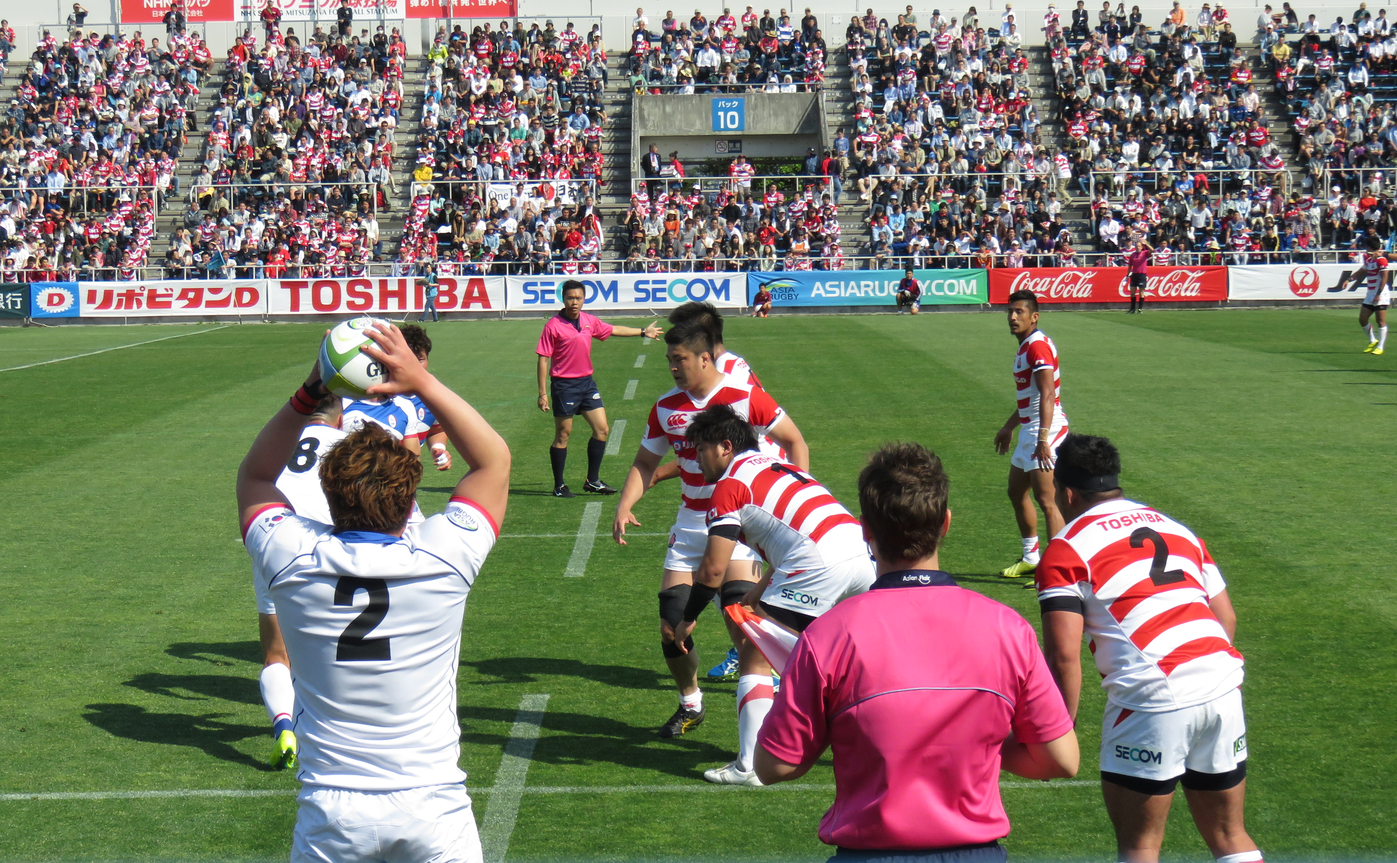 アジアラグビーチャンピオンシップ2016 日本対韓国。